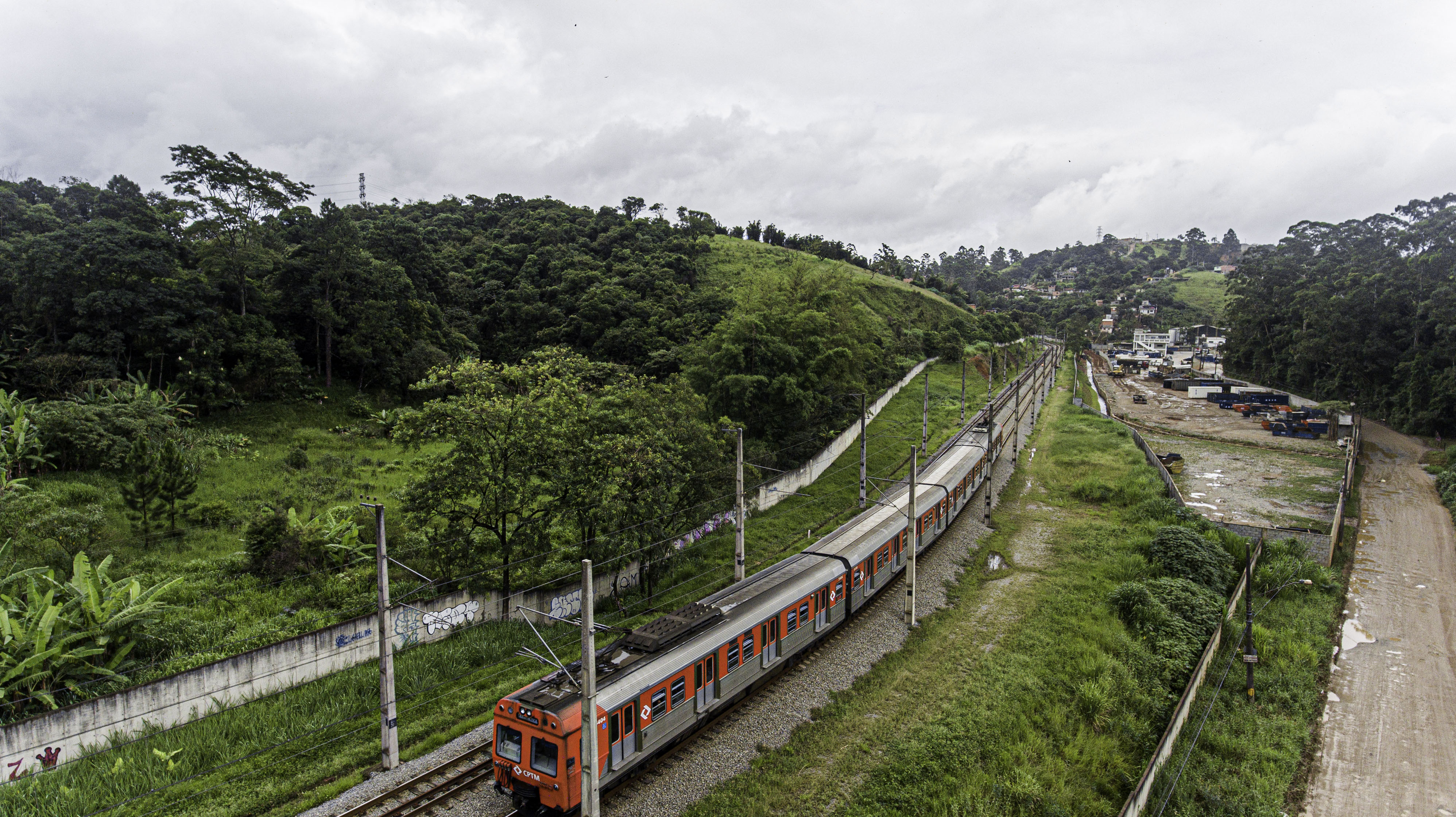 Trem Série 5400 percorrendo trecho na altura da antiga Parada Cimenrita da Linha 8 da CPTM, Itapevi.